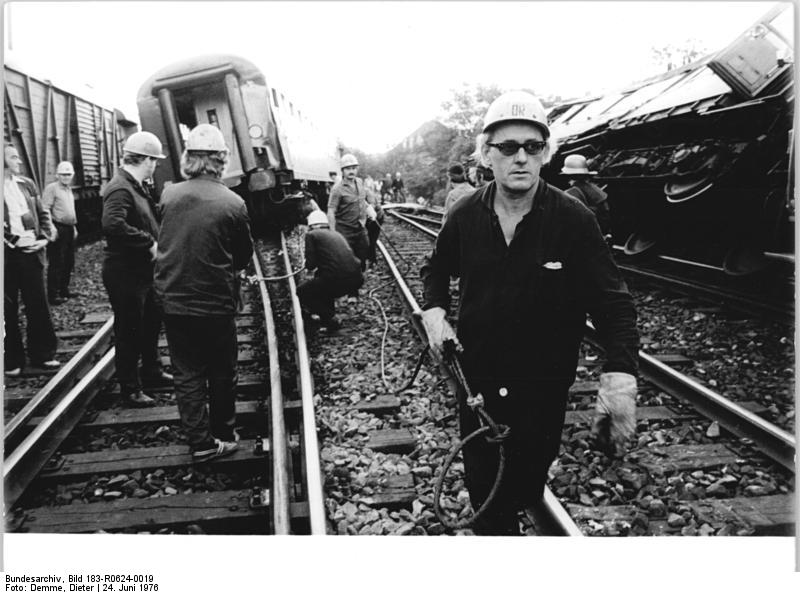 ADN-ZB Demme-24.6.1976-sta-Bez. Erfurt: Zugentgleisung in der Nähe Eisenachs-In der Nähe des Bahnhofs Eisenach entgleisten am 23.6.1976 aus bisher noch nicht geklärter Ursache vier Reisezugwagen des D 354 Berlin-Friedrichstraße - Paris. Fünf Fahrgäste und der Lokführer wurden schwer und 20 weitere Personen leicht verletzt. Sie erhielten im Kreiskrankenhaus der Stadt Erfurt sofort ärztliche Hilfe. Kurz nach dem Unglück wurde mit den Aufräumungsarbeiten begonnen.